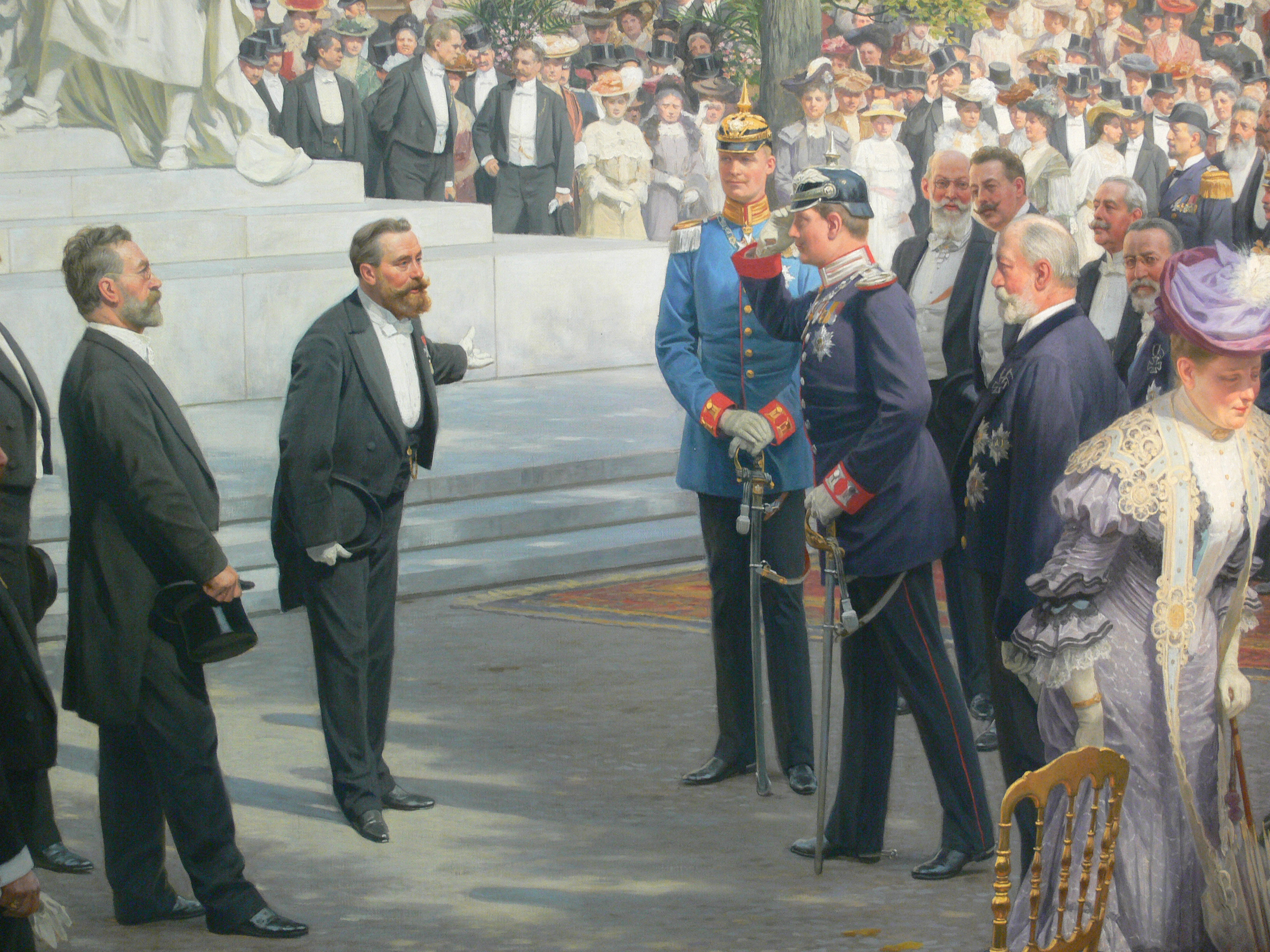 Anton von Werner: Enthüllung des Richard-Wagner-Denkmals im Tiergarten, Öl auf Leinwand, 1908 Berlinische Galerie Native nameBerlinische GalerieLocationBerlinCoordinates52° 30′ 15″ N, 13° 23′ 56″ E Established1975, 2004 (moved to present quarters)Website Detail